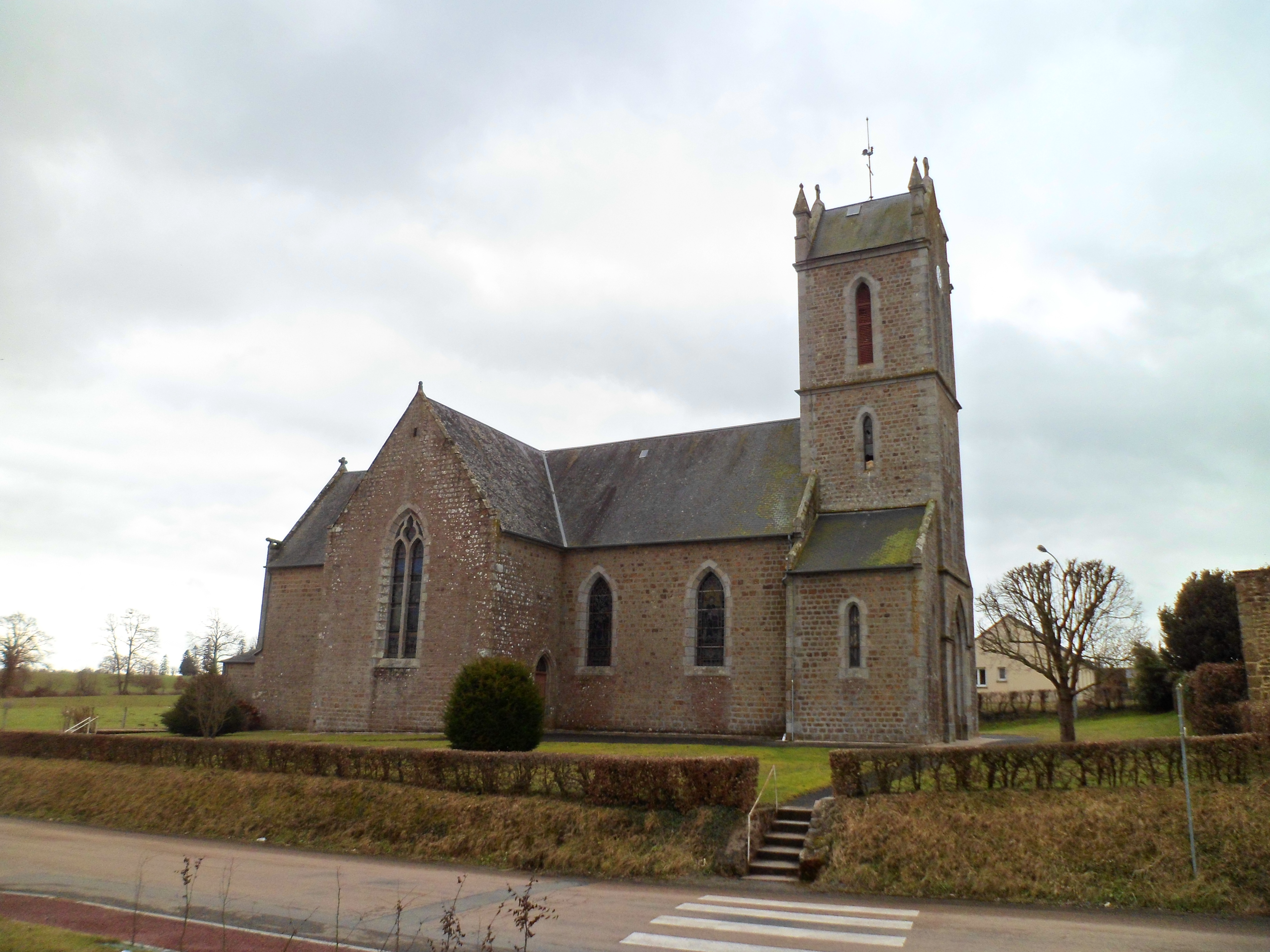 Église Saint-Hilaire de Villechien